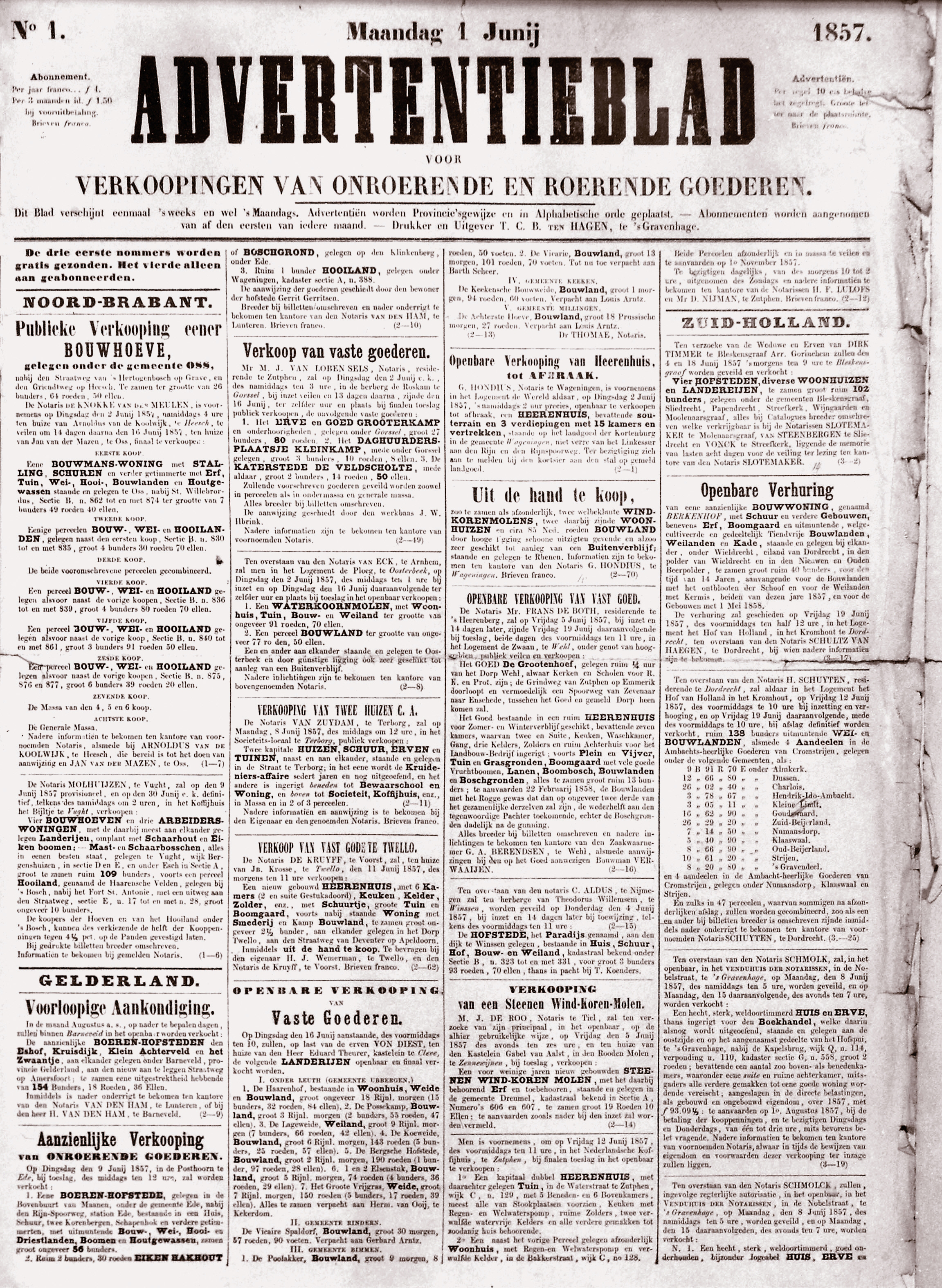 Eerste uitgave van het Advertentieblad voor verkoopingen van roerende en onroerende goederen. Het document is tegenwoordig eigendom van de Koninklijke Bibliotheek (Nederland) in Den Haag, 1 juni 1857. Nu Cobouw